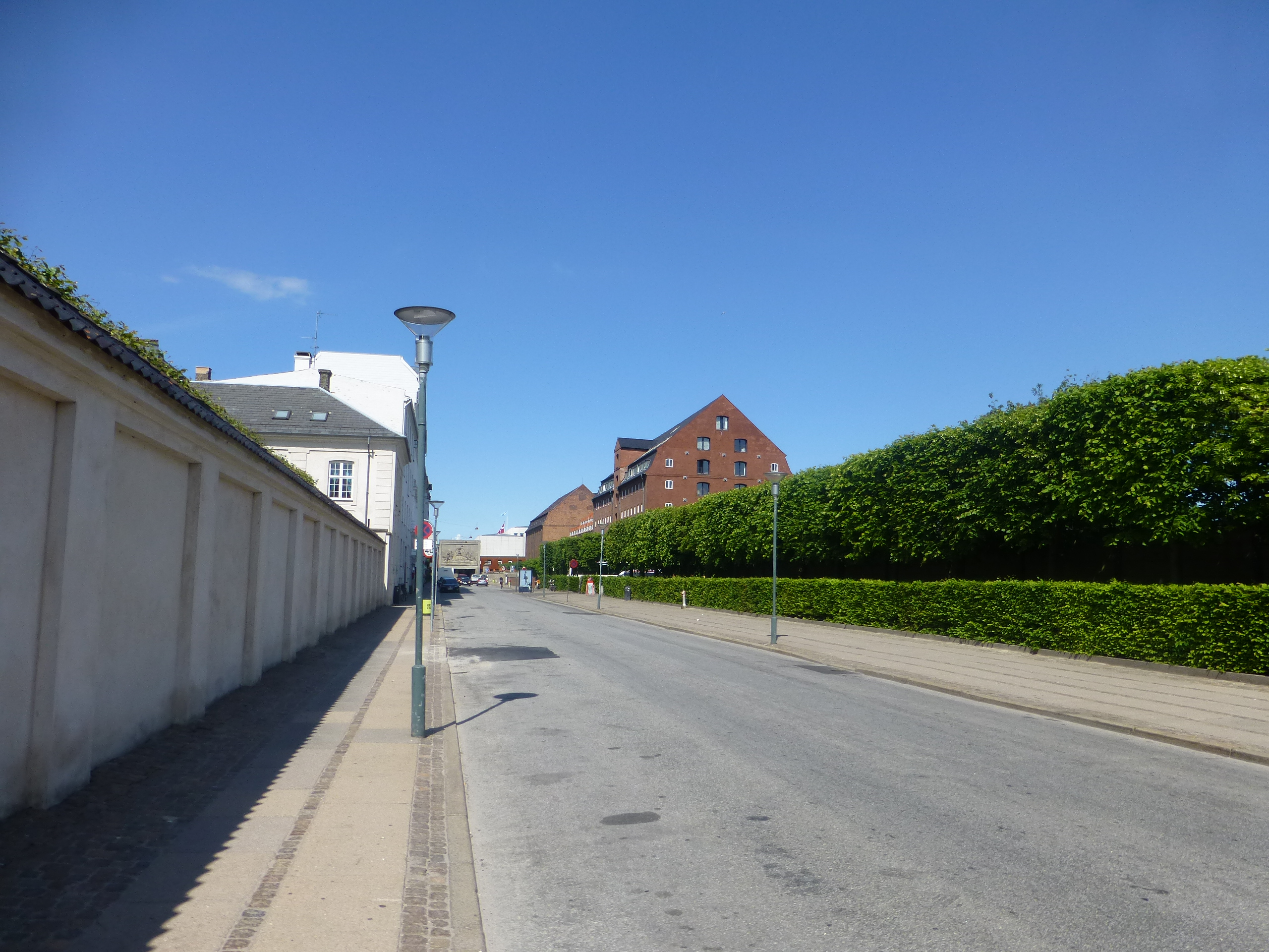 The street Toldbodgade in Indre By, Copenhagen.